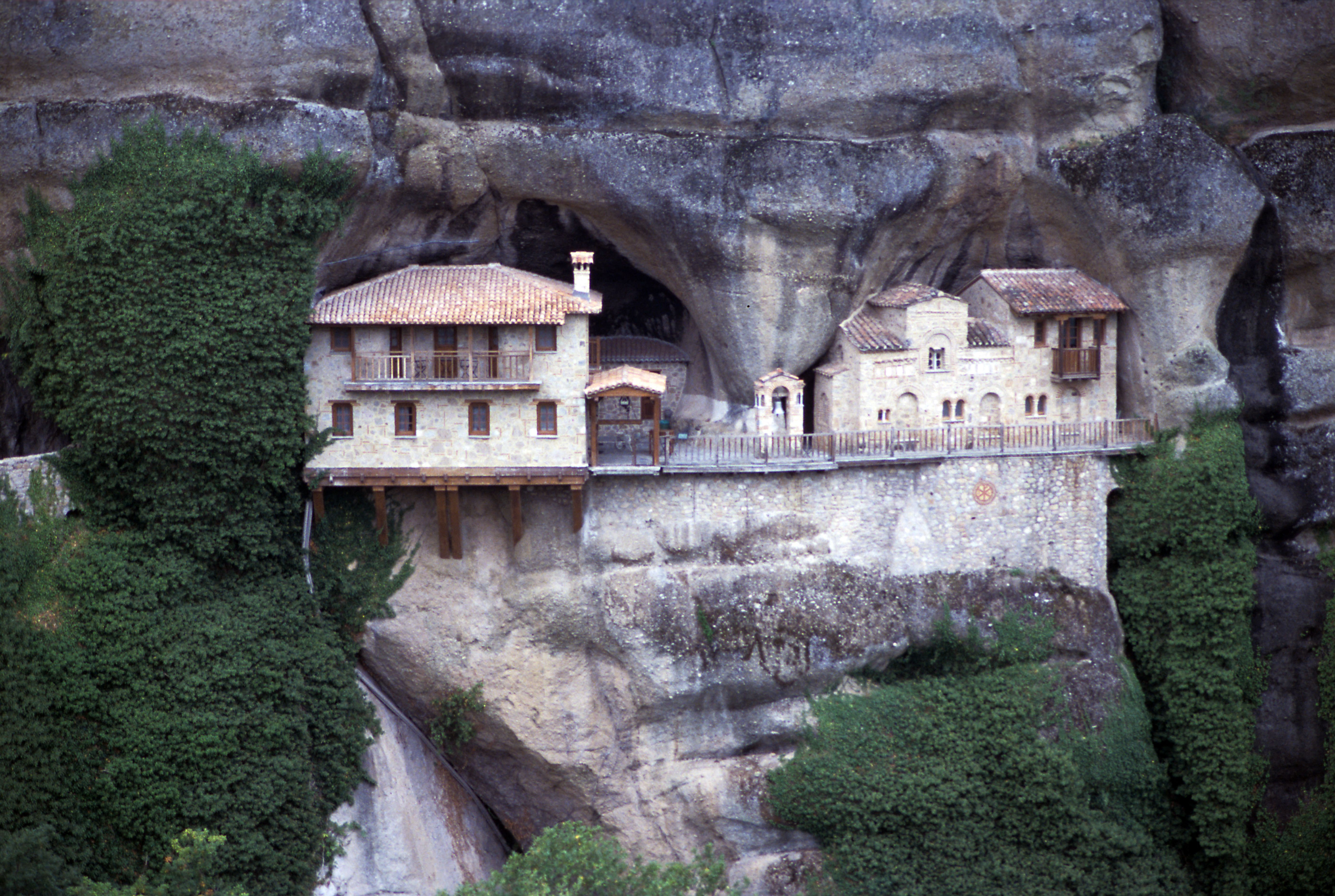 Das einzige der erhaltenen Meteoraklöster, das in einer Wandnische und nicht auf einer Bergkuppe liegt. Bei der Sanierung nach 2000 wurden auch Ver- und Entsorgungsleitungen verlegt.